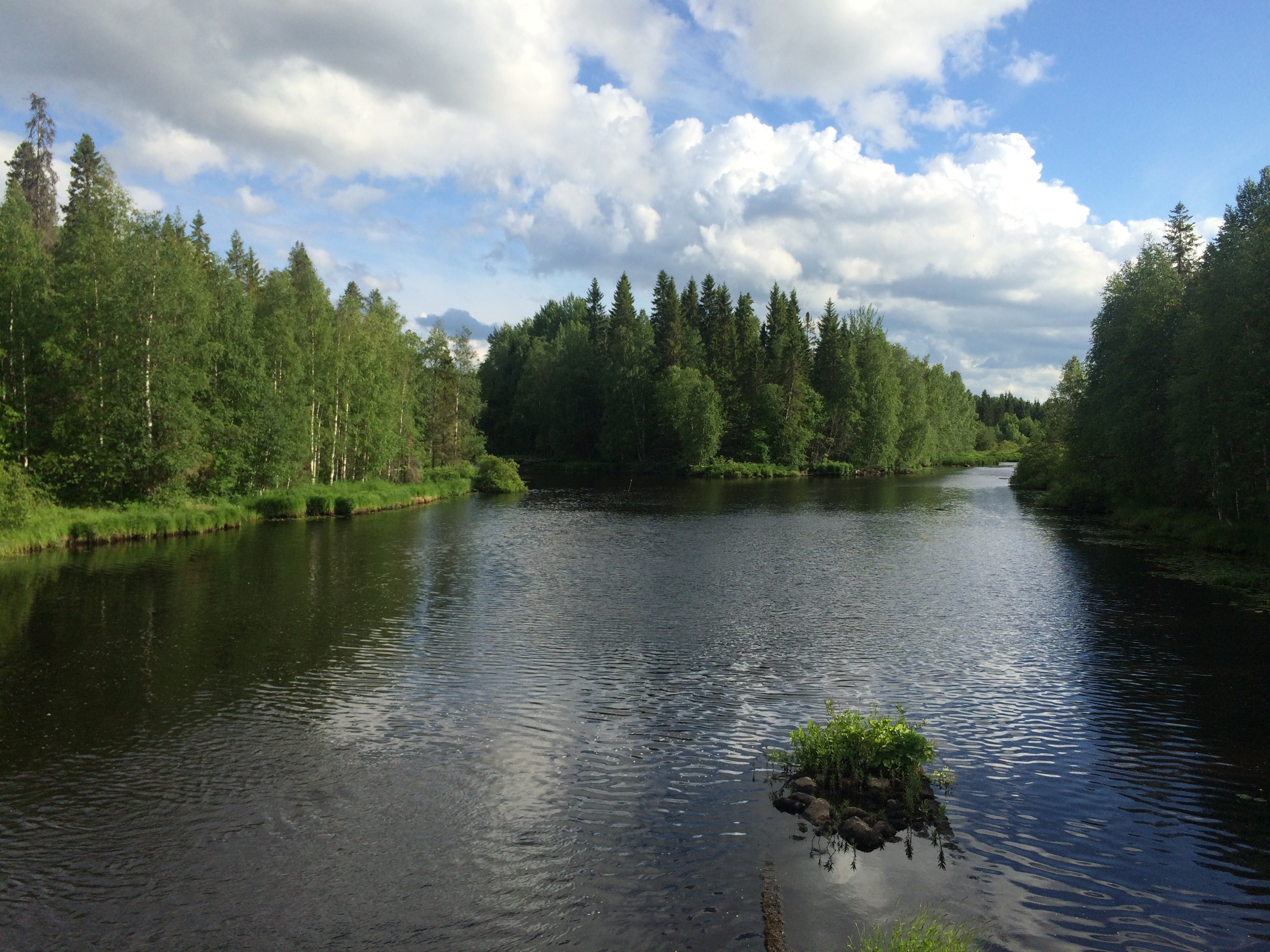 Вожма (река, впадает в Выгозеро)